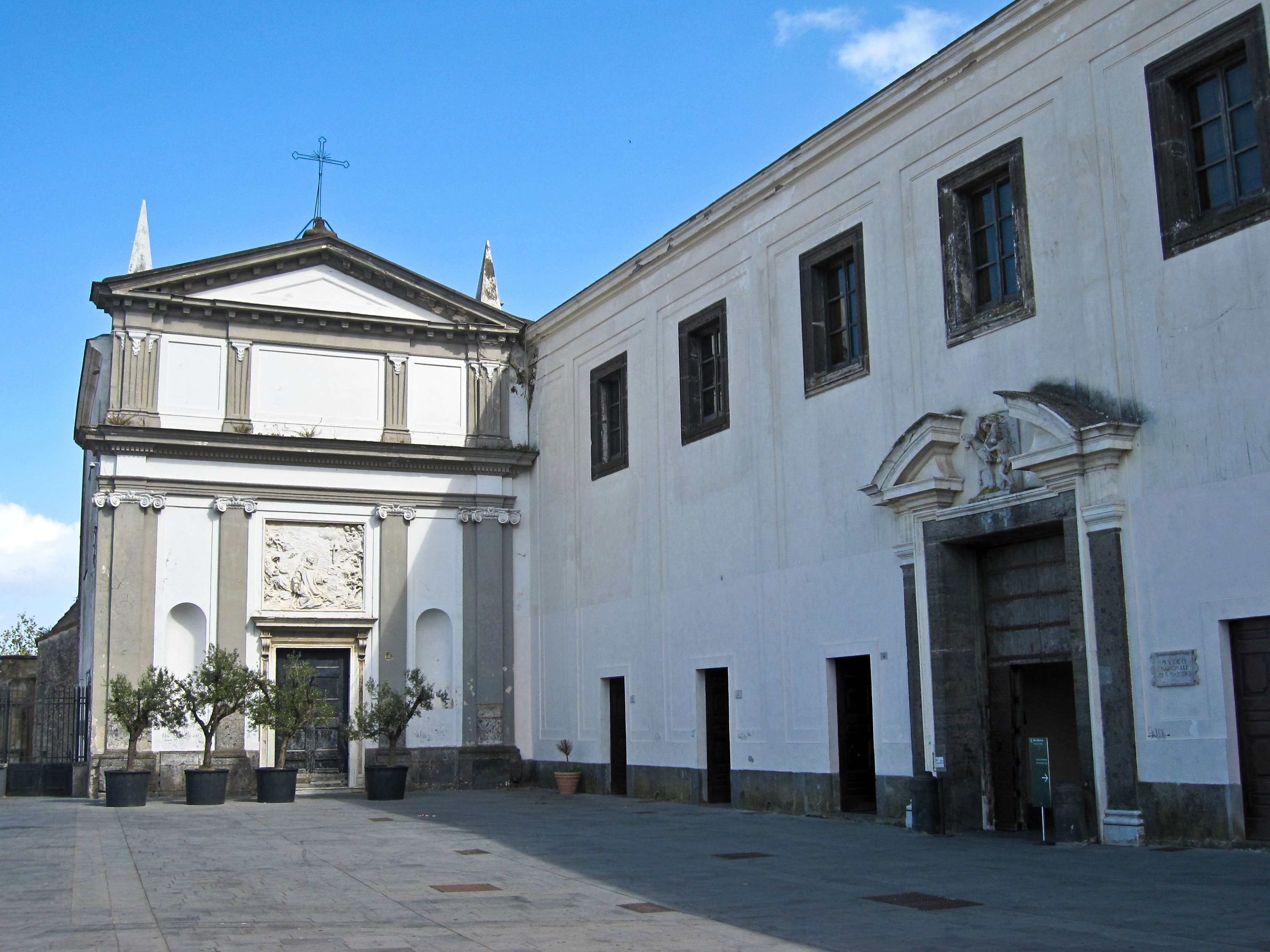 L'ingresso del Museo sulla destra e la Chiesa delle donne di fronte.